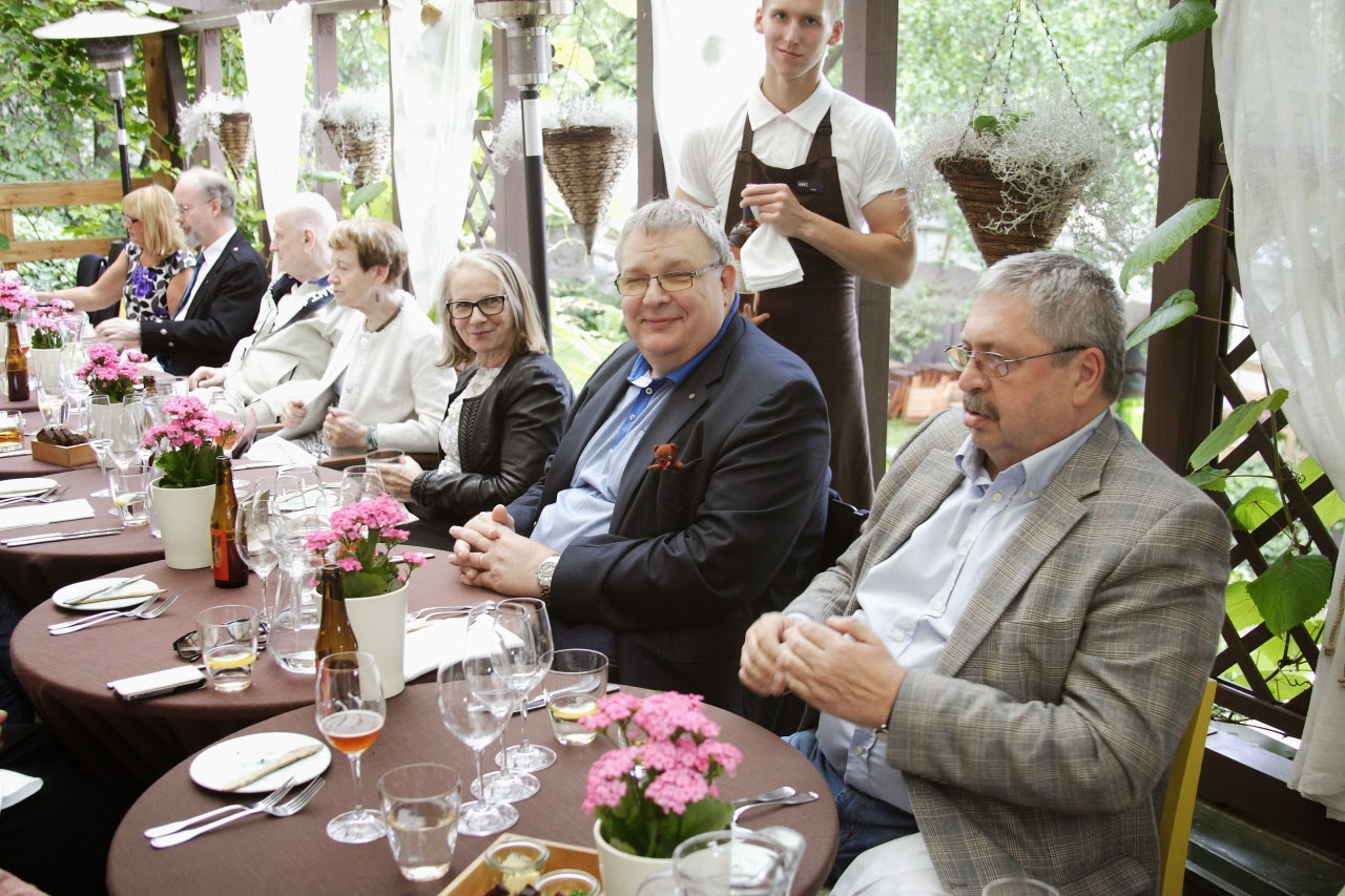 Šoti Klubi Suveõhtusöök 2014-6